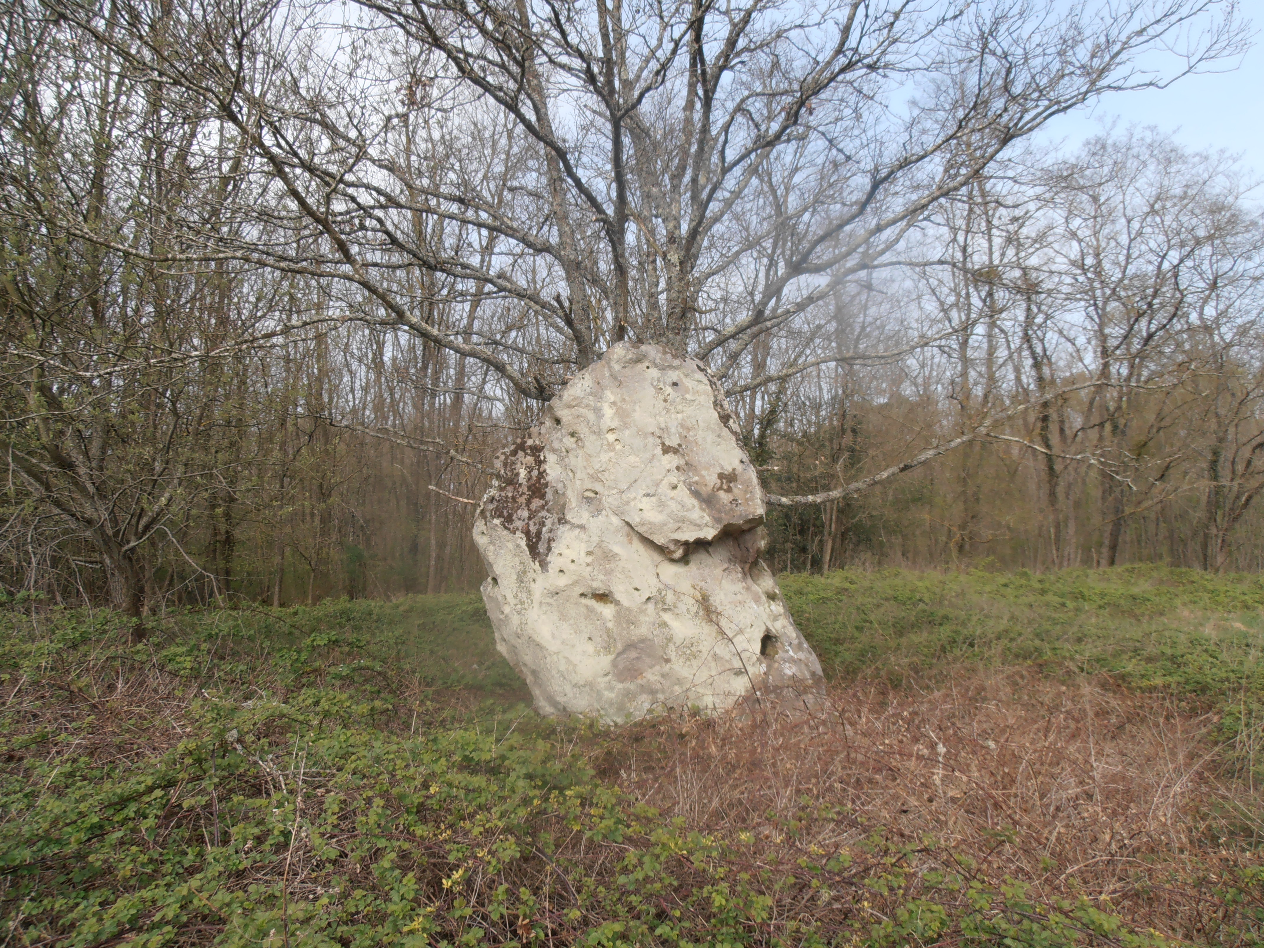 Menhir des Pommesoies à Verlin (Yonne) France